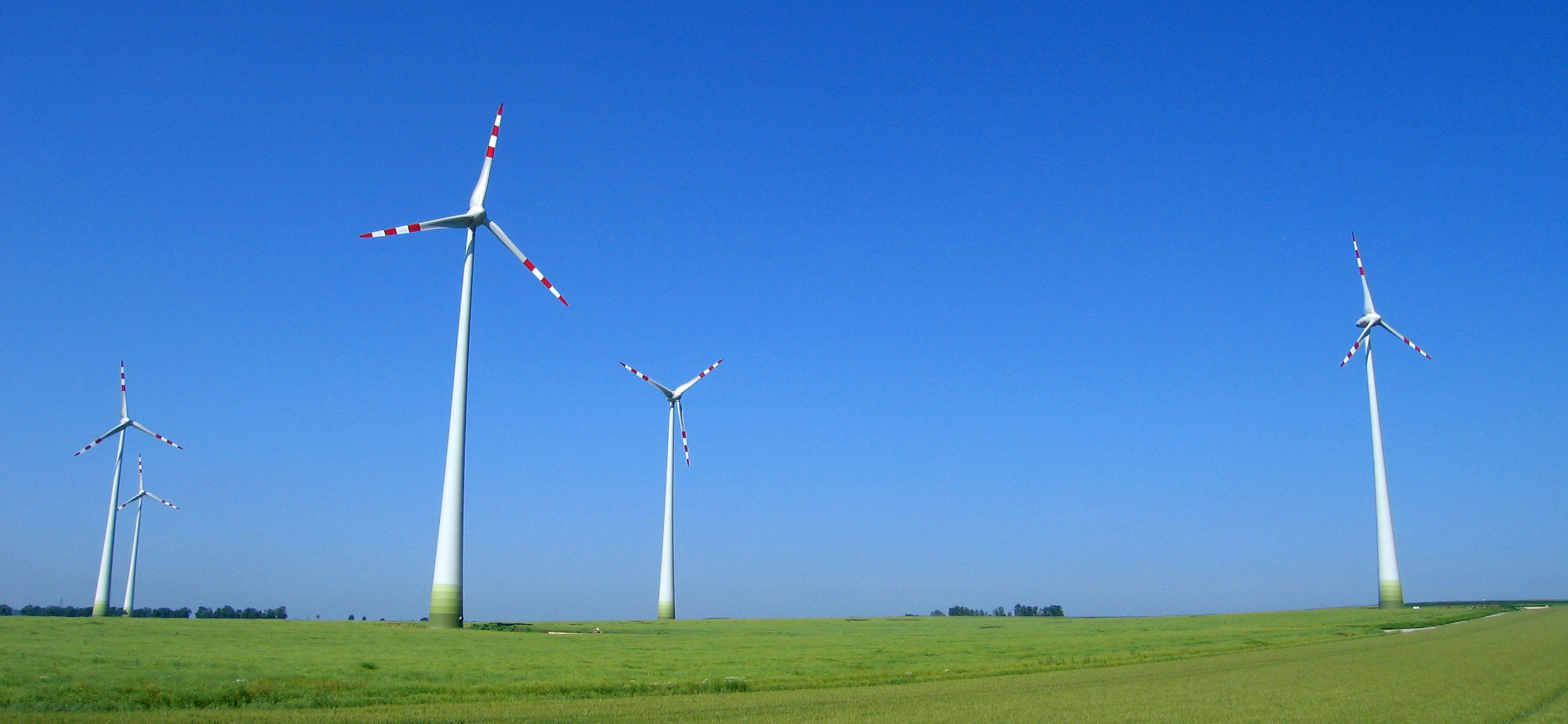 Wind turbines in Austria.